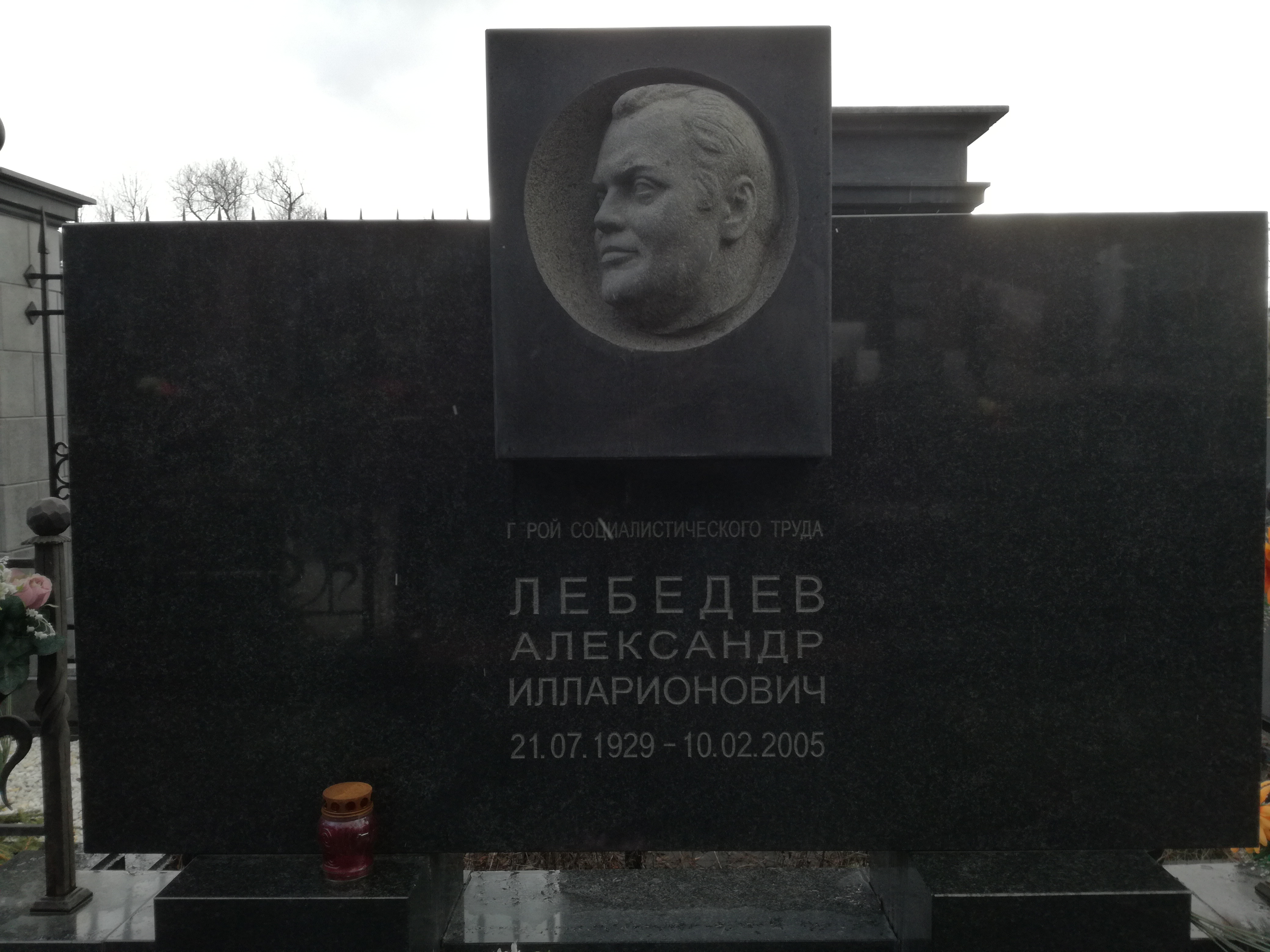 Даниловское кладбище